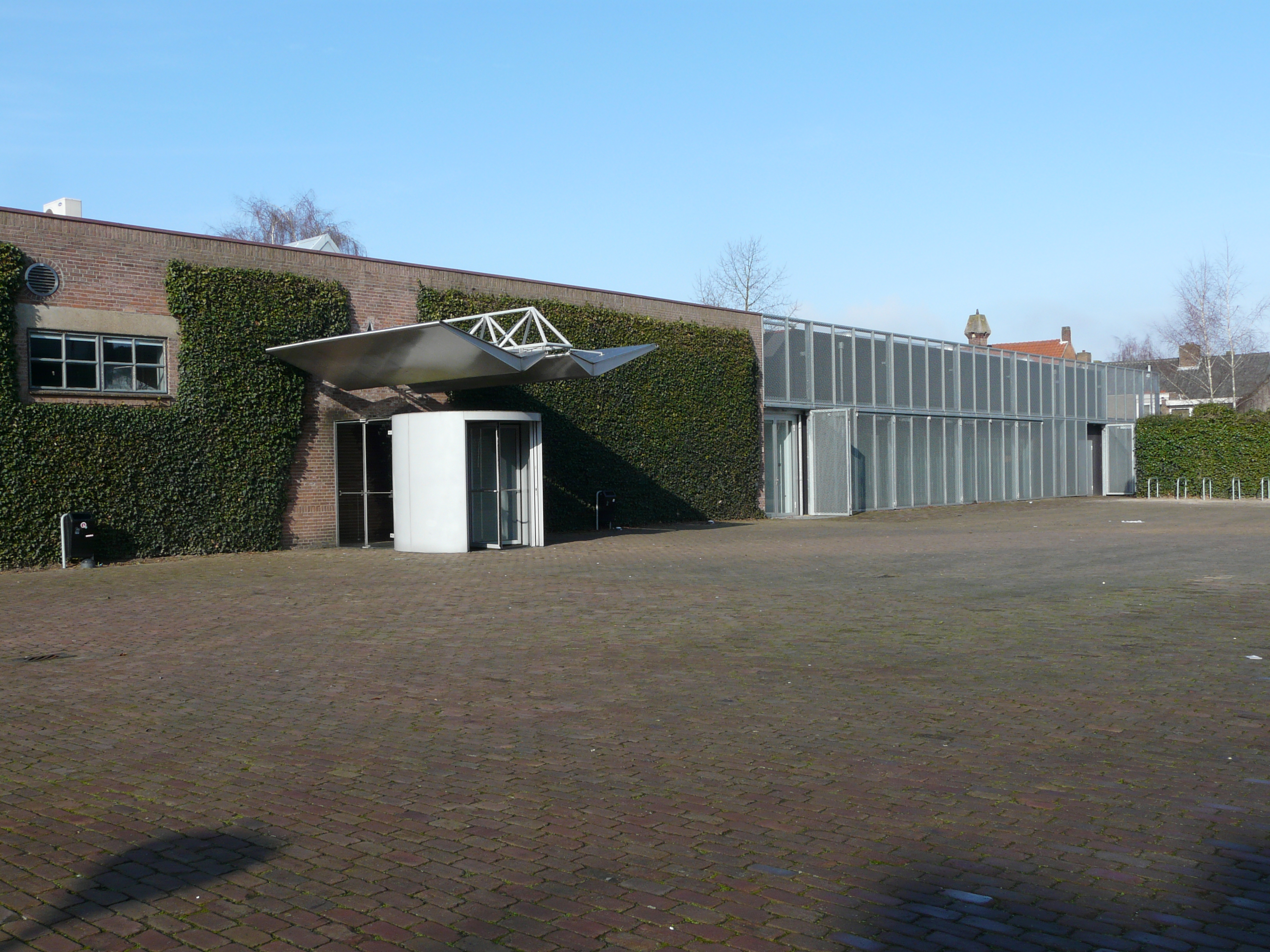 Museum De Pont in Tilburg